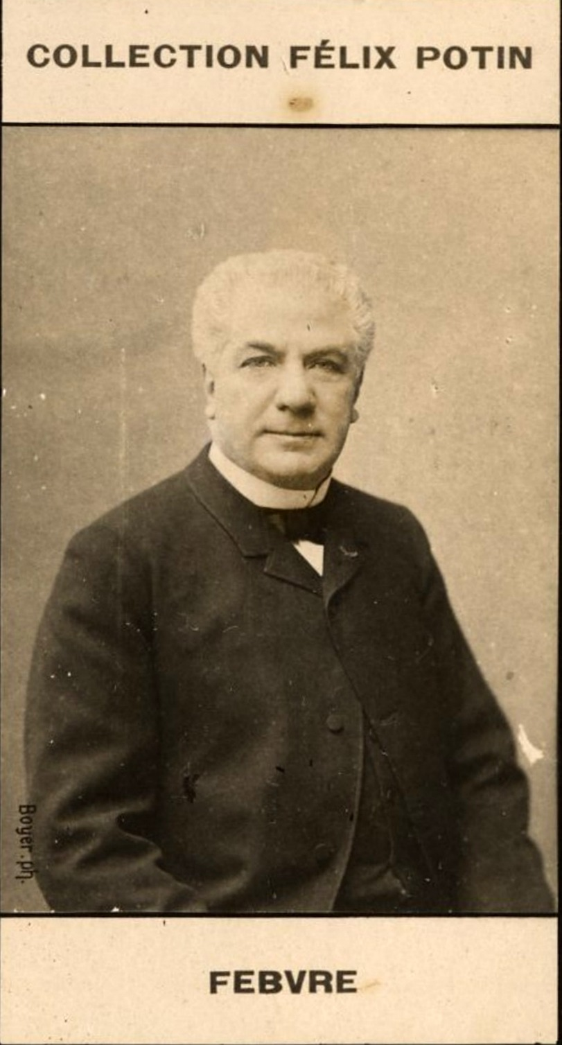 Febvre